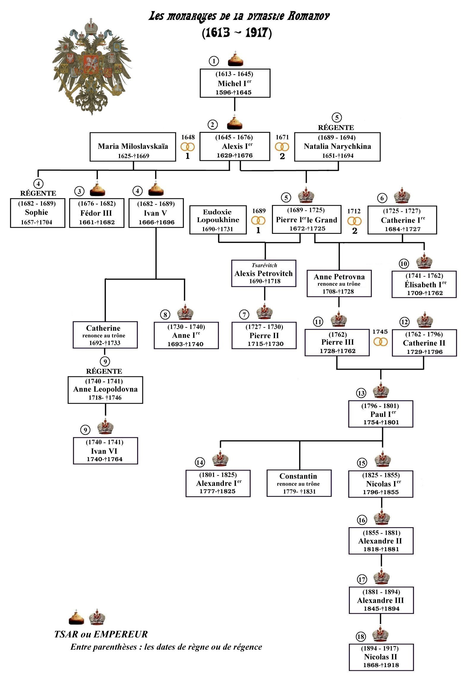 Graphique des monarques de la dynastie Romanov